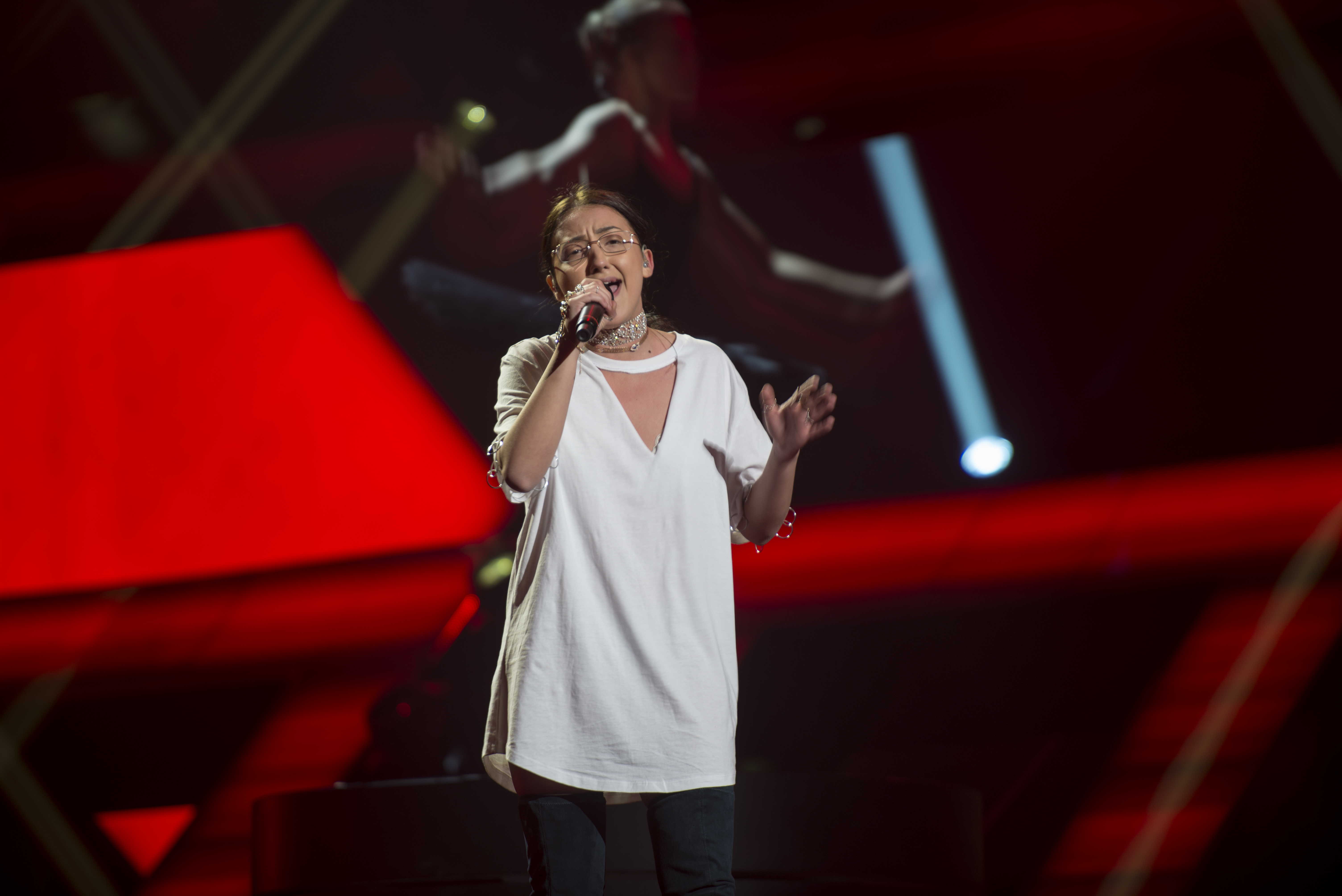 Adrijana på en repetition under första deltävlingen av Melodifestivalen 2017 i Göteborg.